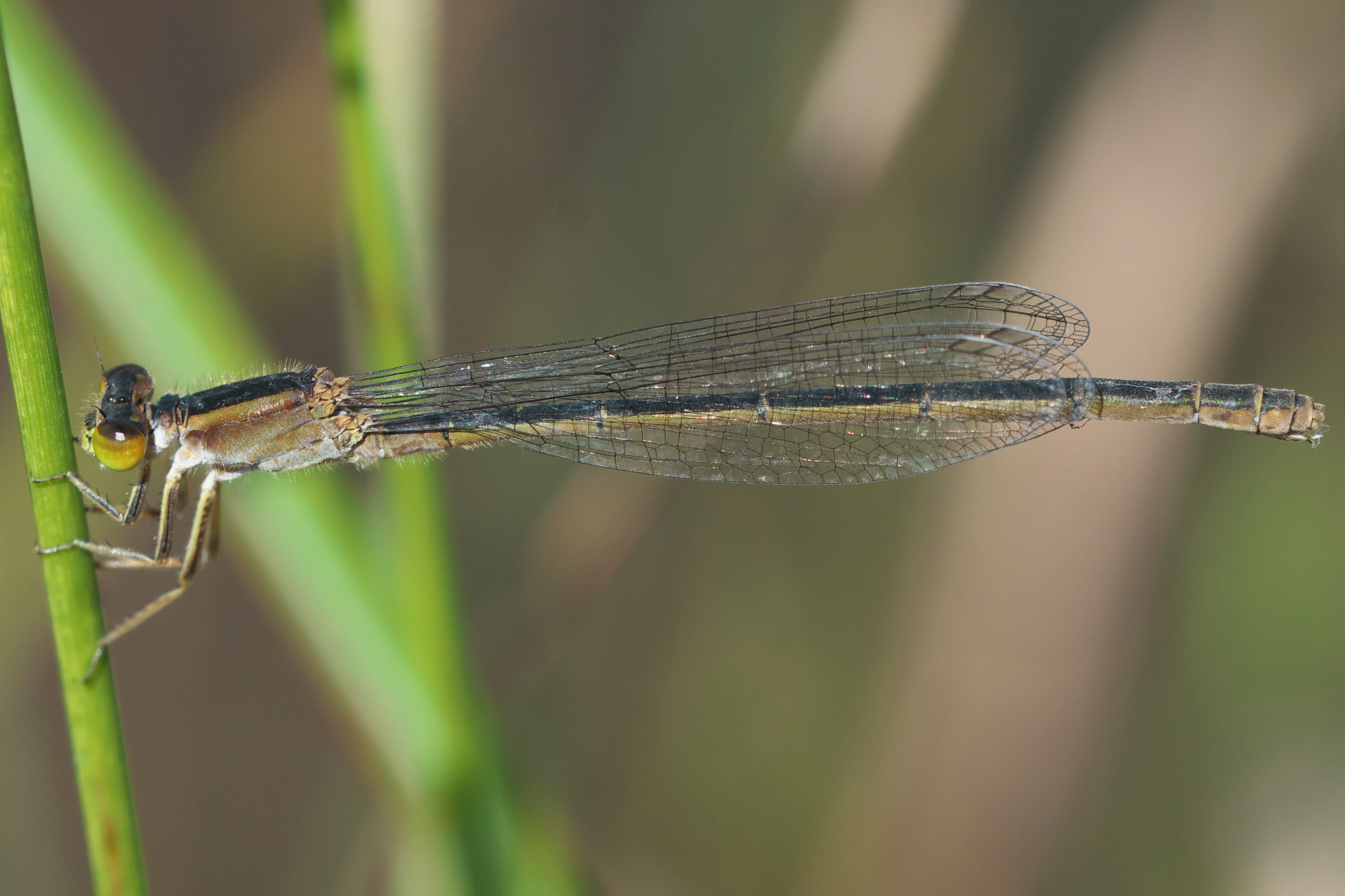 アオモンイトトンボ雌 広島県